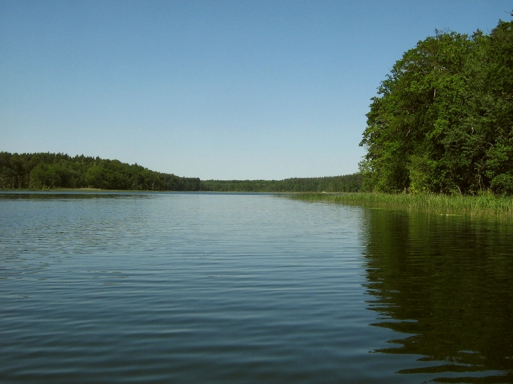 Der Mühlensee bei Ankershagen Landkreis Müritz, (Mecklenburg-Vorpommern, Germany). Der Mühlensee ist einer der ursprünglichen Quellseen der Havel. Seit einem Dammbau entwässert er über den Mühlenbach, den Wurzenbach, den Aalbach, die Tollense, die Peene und den Peenestrom in die Ostsee. Das durch den Damm sickernde Wasser speist eine künstlich nachgestaltete Havelquelle am Diekenbruch, so daß der Mühlensee symbolisch wieder als Havelquellsee gelten kann. symbolische Havelquelle, im Hintergrund der Mühlensee